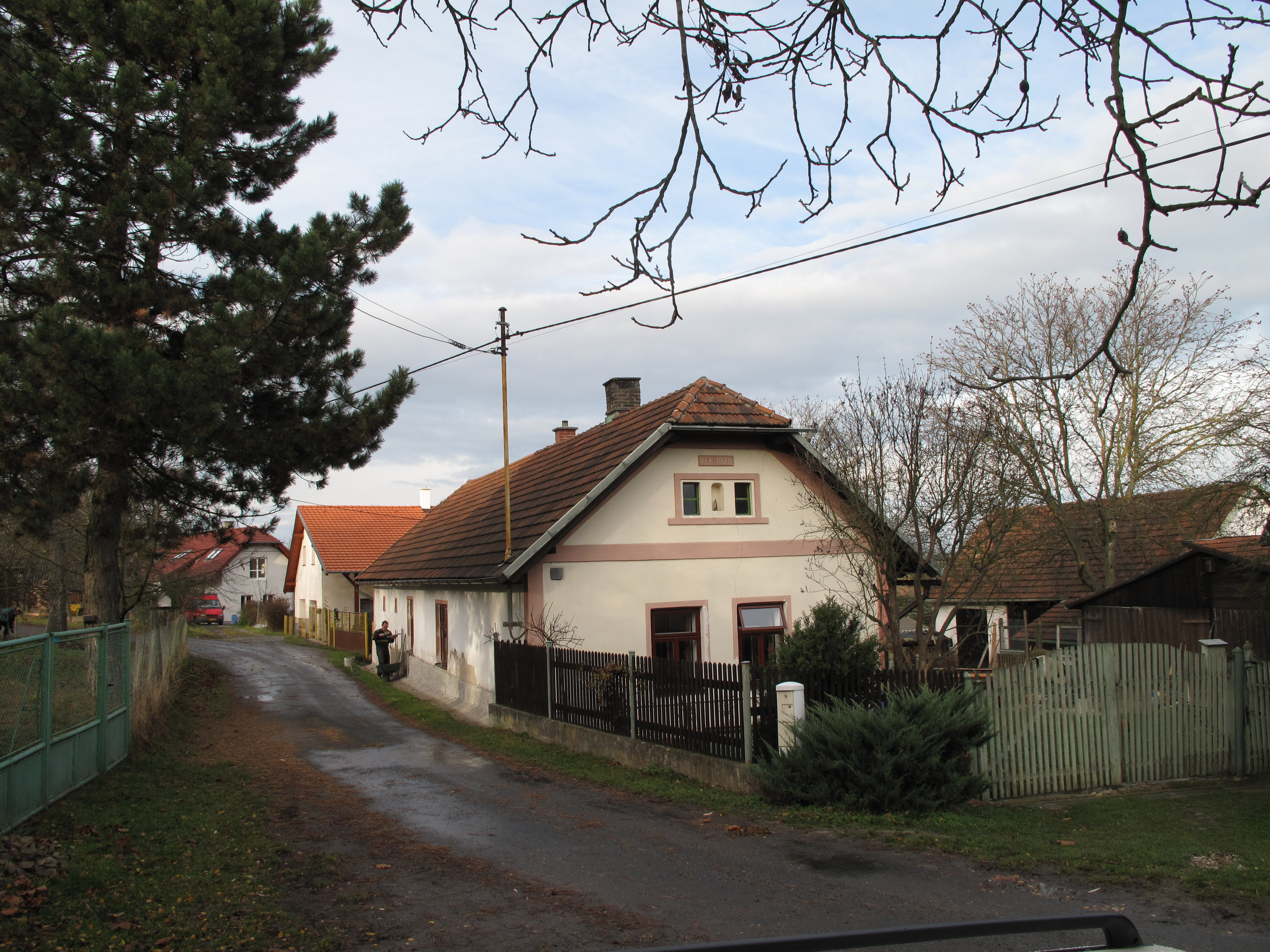 Dům v Hatově. Okres Tábor, Česká republika. Personality rights warningAlthough this work is freely licensed or in the public domain, the person(s) shown may have rights that legally restrict certain re-uses unless those depicted consent to such uses. In these cases, a model release or other evidence of consent could protect you from infringement claims.